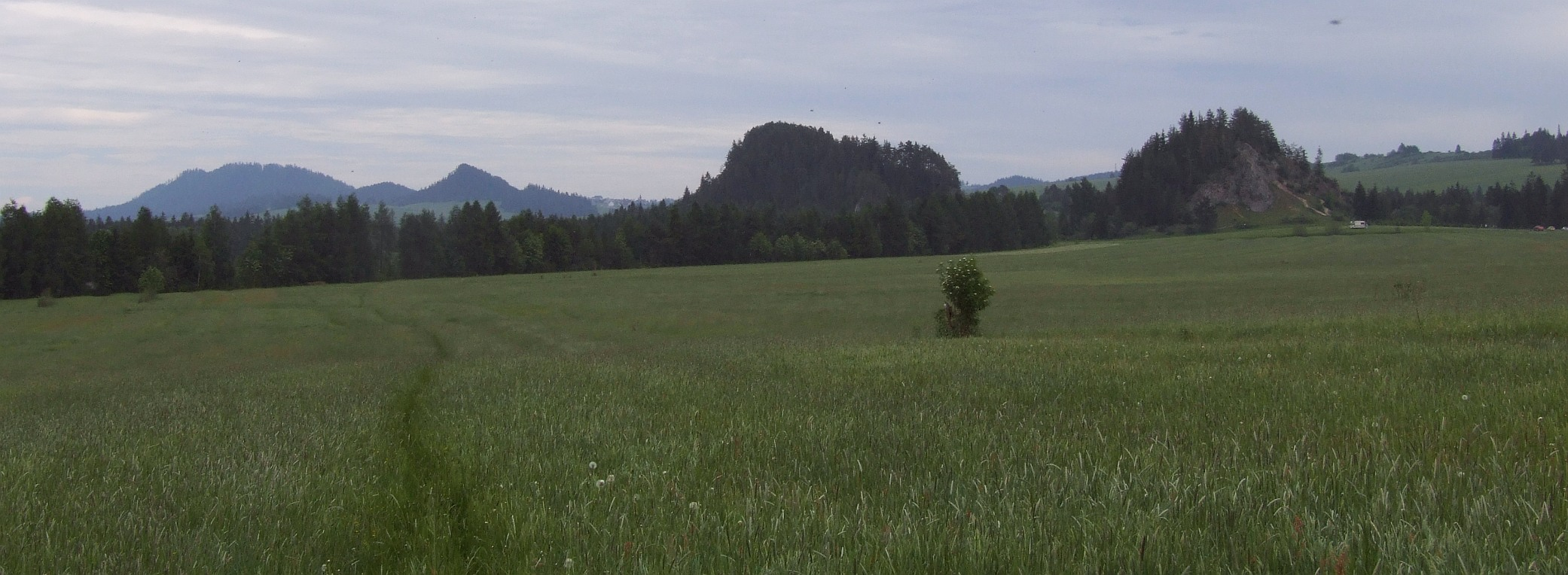 Kramnica i Obłazowa (w rezerwacie Przełom Białki pod Krempachami)